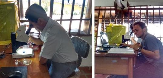 UniArco y el Lab. Ecología Sensorial del IVIC Mérida estudian sobre la Entomofauna asociada a Morus alba (Morera)